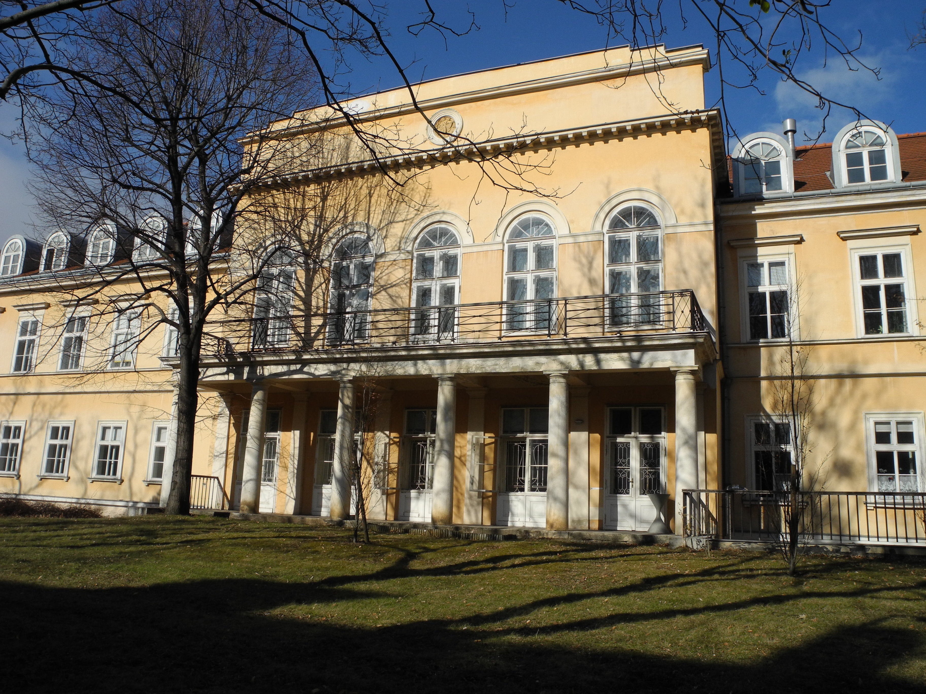 Bezirksamt, ehem. Villa und Privatheilanstalt, ehem. Villa des ung. Grafen Széchzényi. Auch bekannt als Heniksteinvilla.Die Heniksteinvilla im Wien Geschichte Wiki